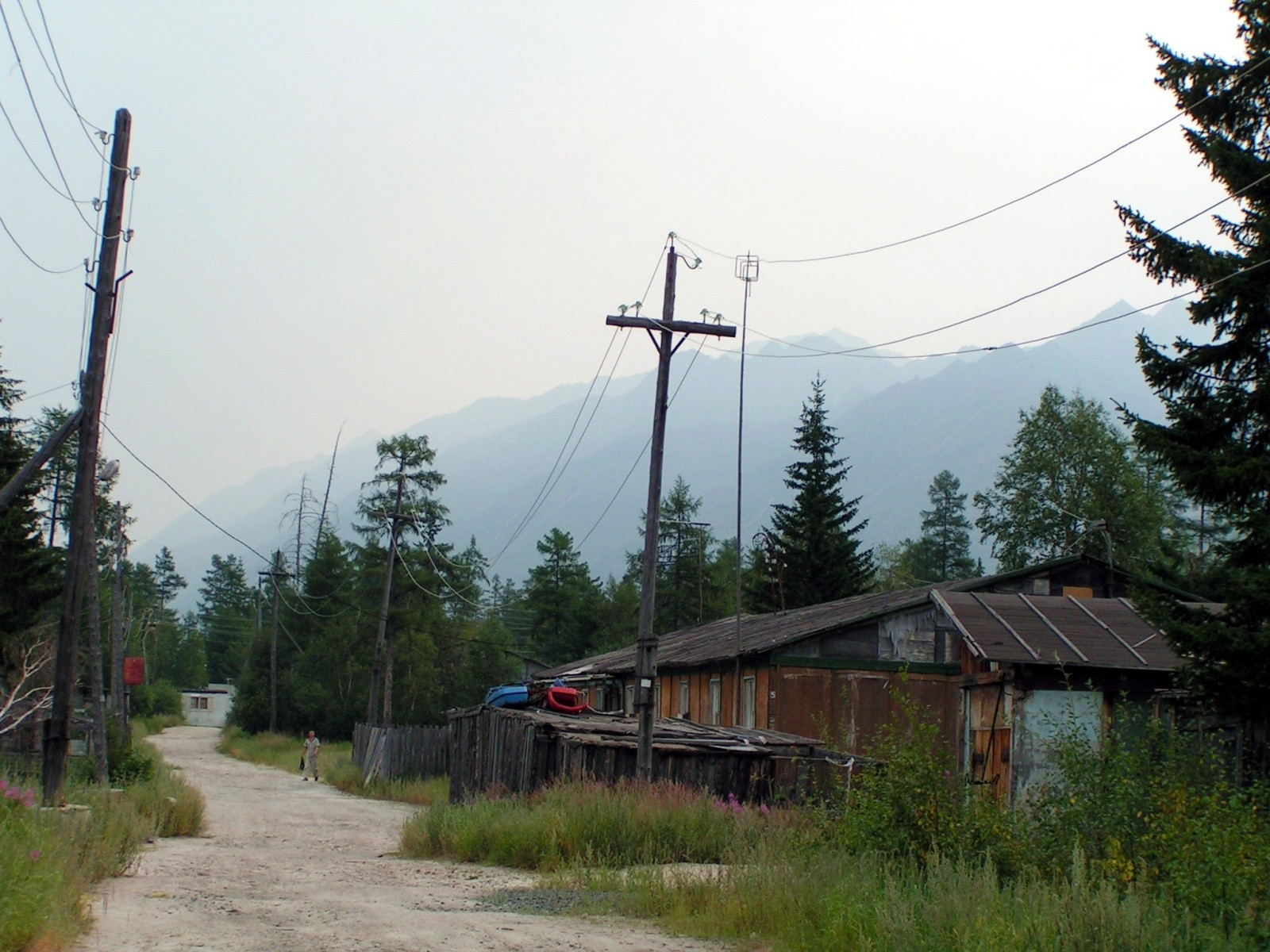 Посёлок Осыпной на БАМе